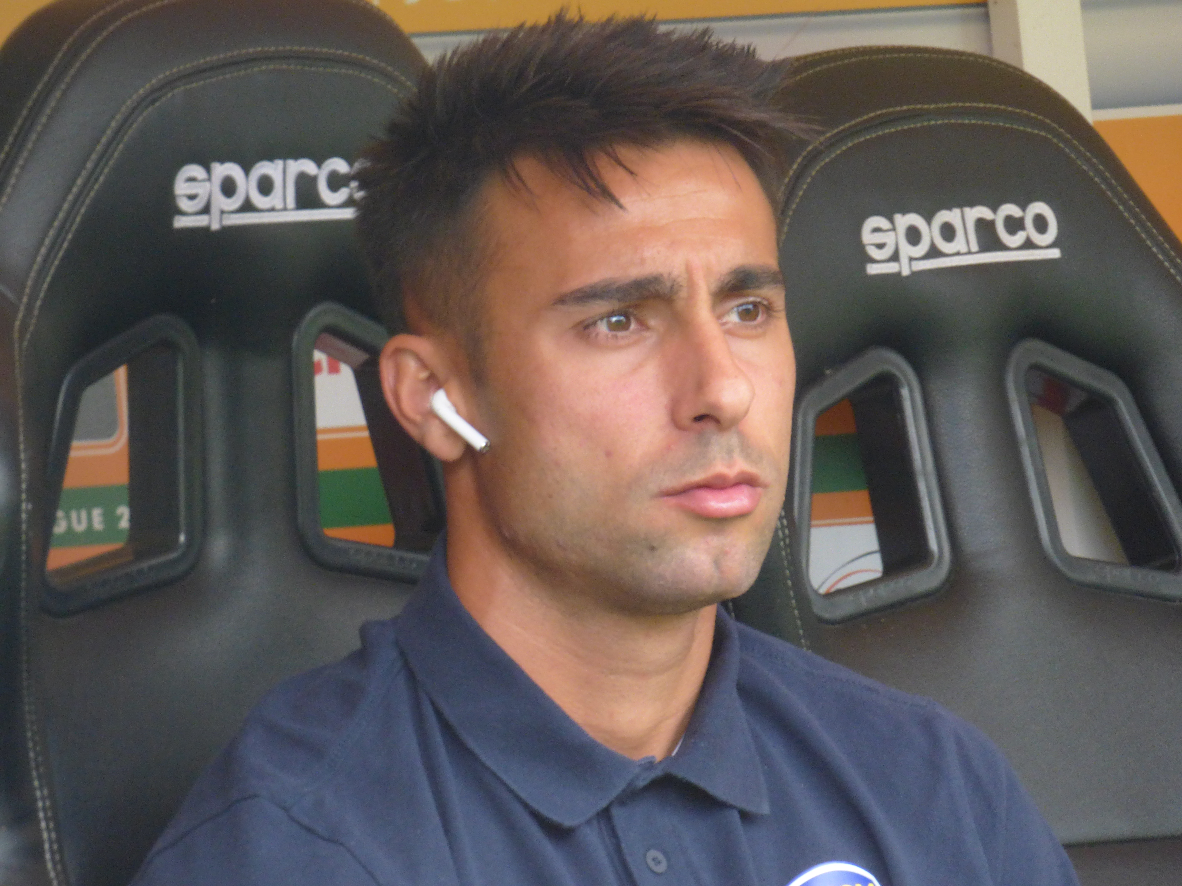 Rafa Navarro avant le match Lens / Sochaux, comptant pour la septième journée du championnat de France de football de Ligue 2, le 15 septembre 2018.